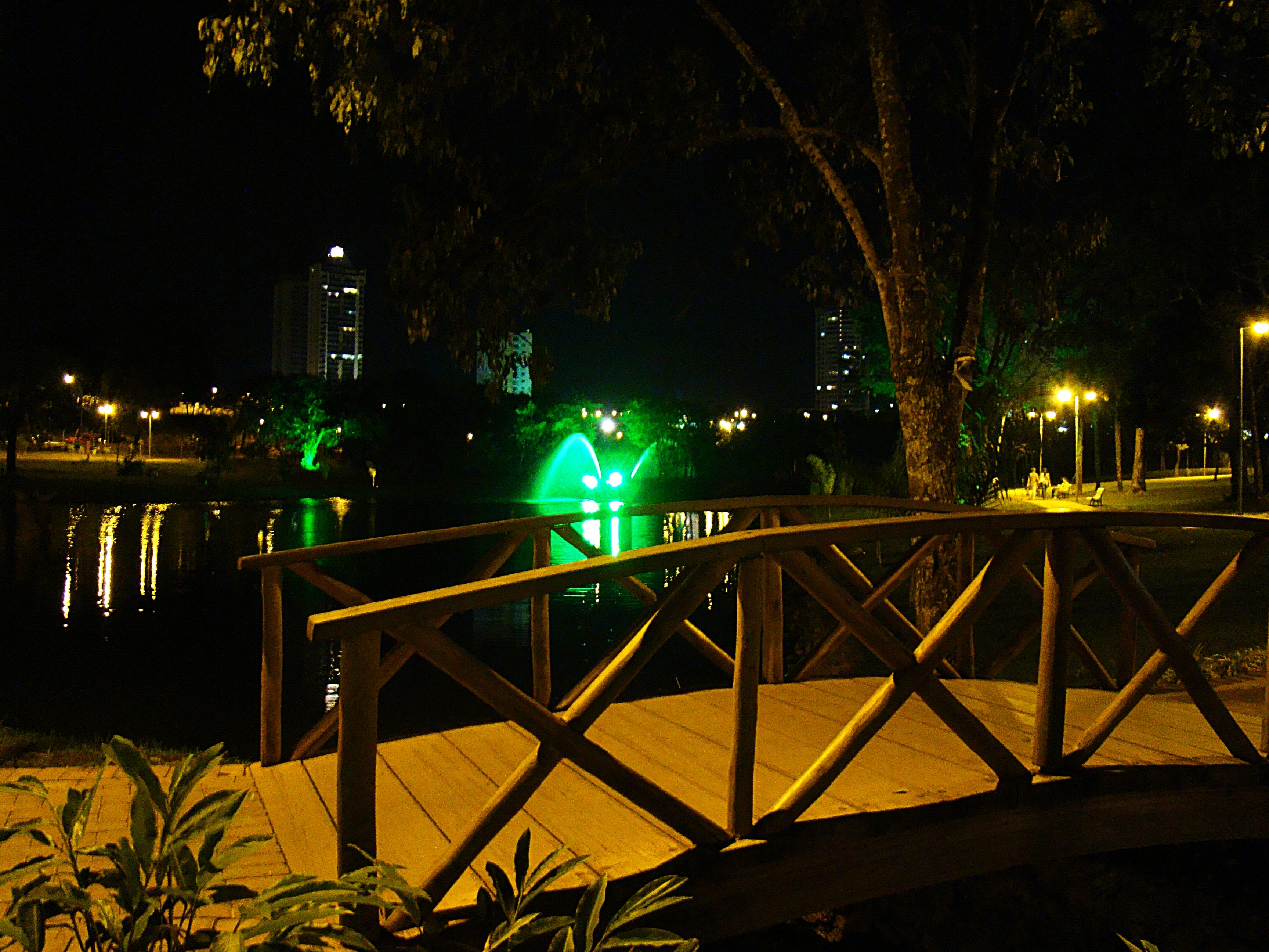 Parque Flamboyant - Goiânia - Goiás - Brasil